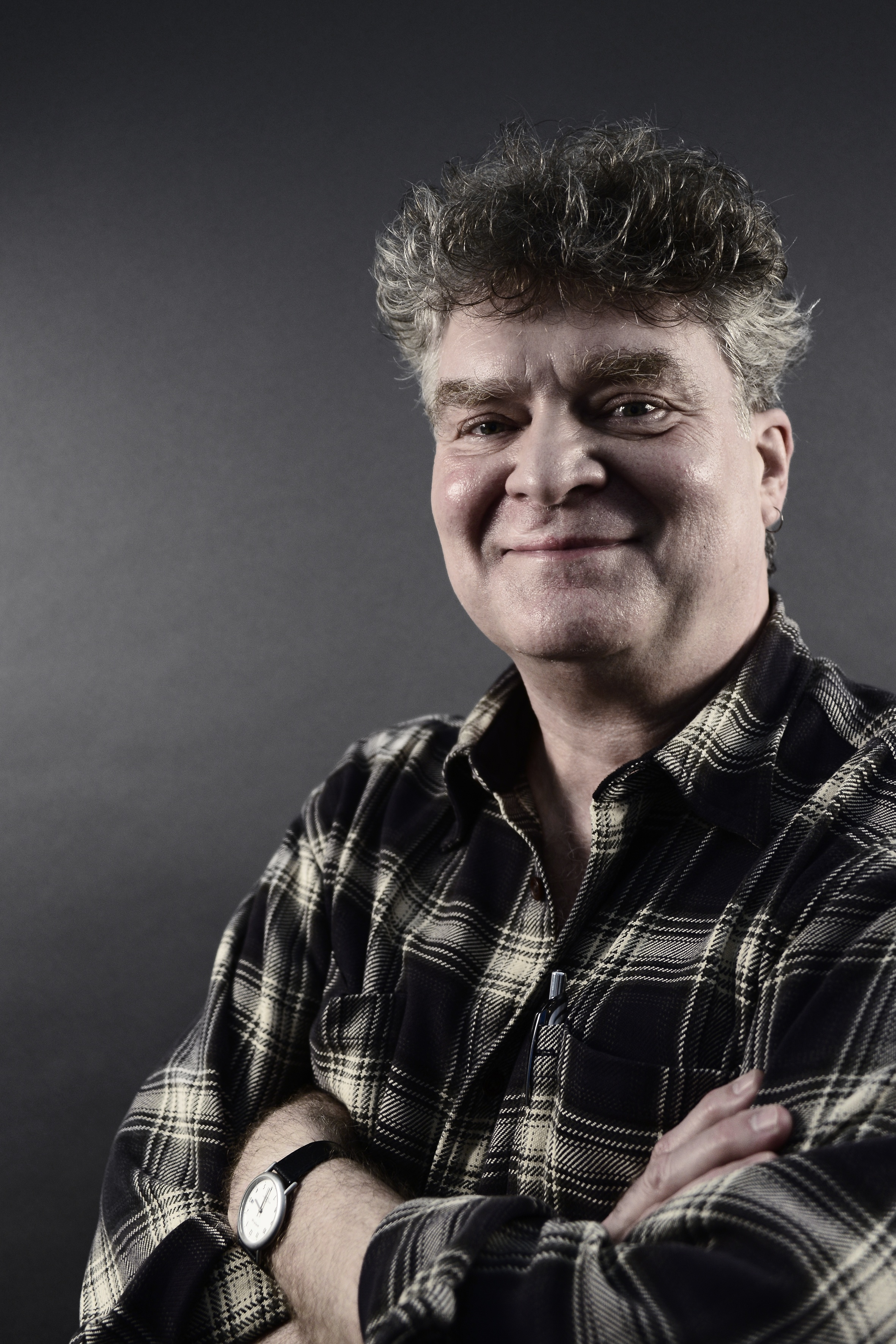 foto: Cirone-Musi